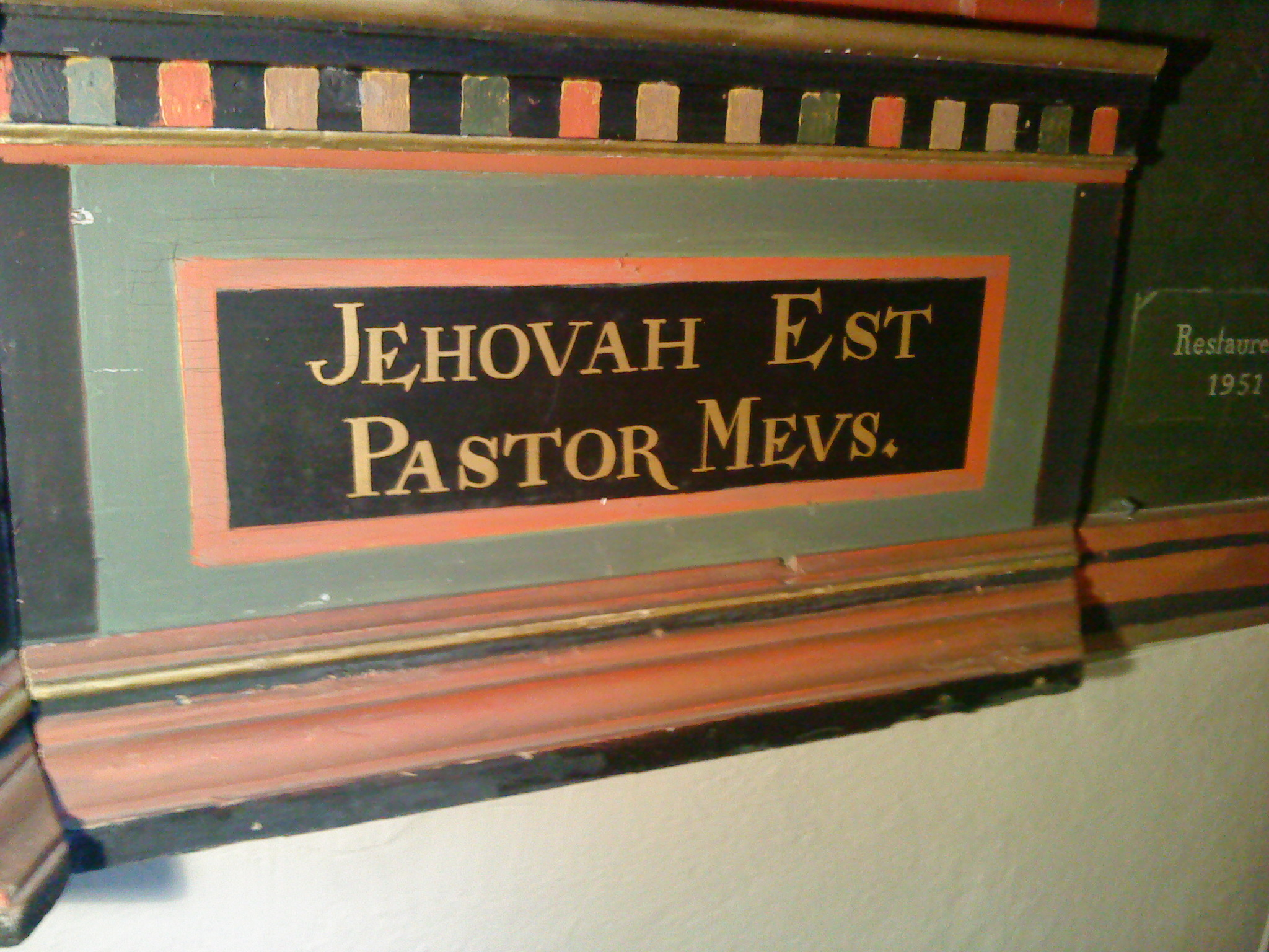 Text på predikstolen: "Jehovah Est Pastor Mevs"